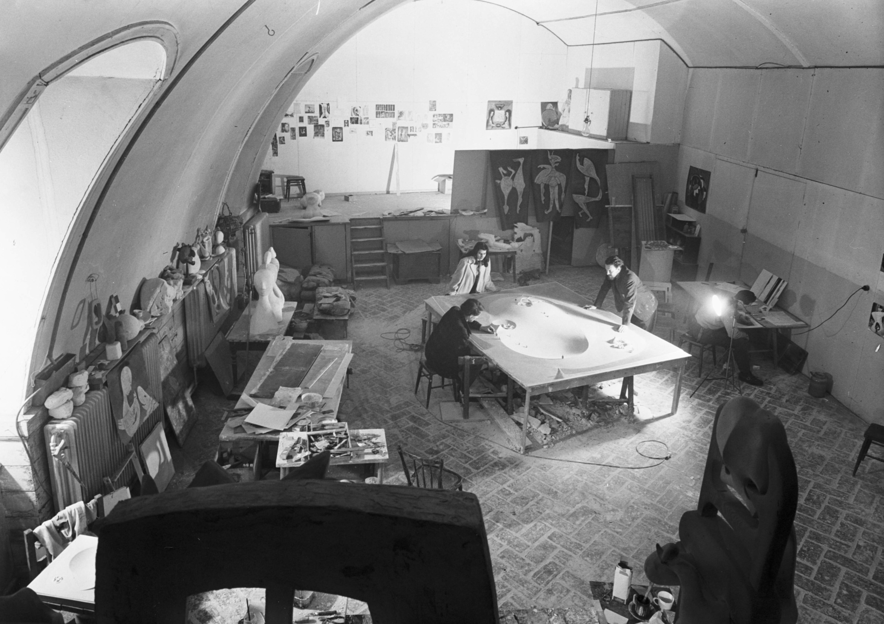 Birgit Åkesson, Ralph Erskine och Egon Möller-Nielsen i Möller Nielsens ateljé